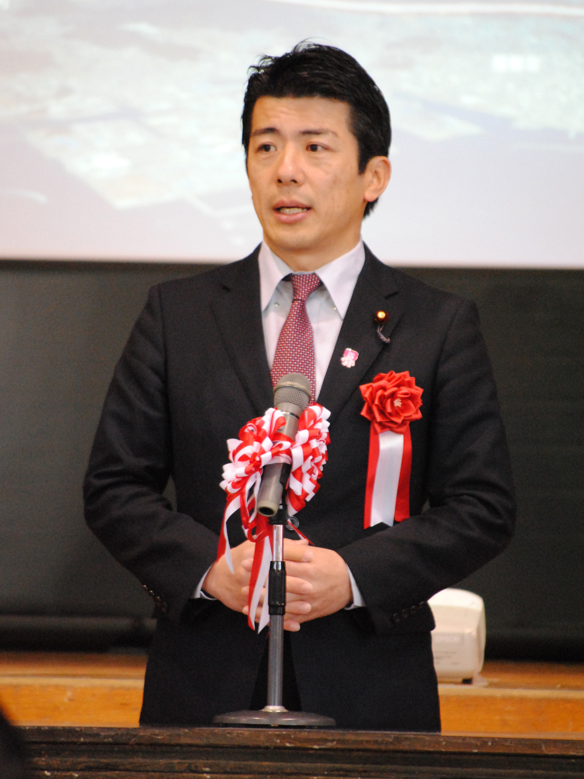 重徳和彦。国道23号蒲郡バイパス（蒲郡IC～幸田芦谷IC）開通式典にて